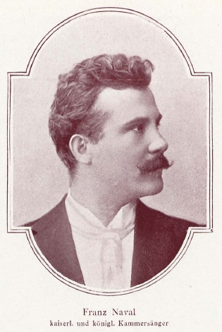 Franz Naval (1865-1939), ein in Frankfurt a. M., Berlin, Wien und New York tätiger Opernsänger.